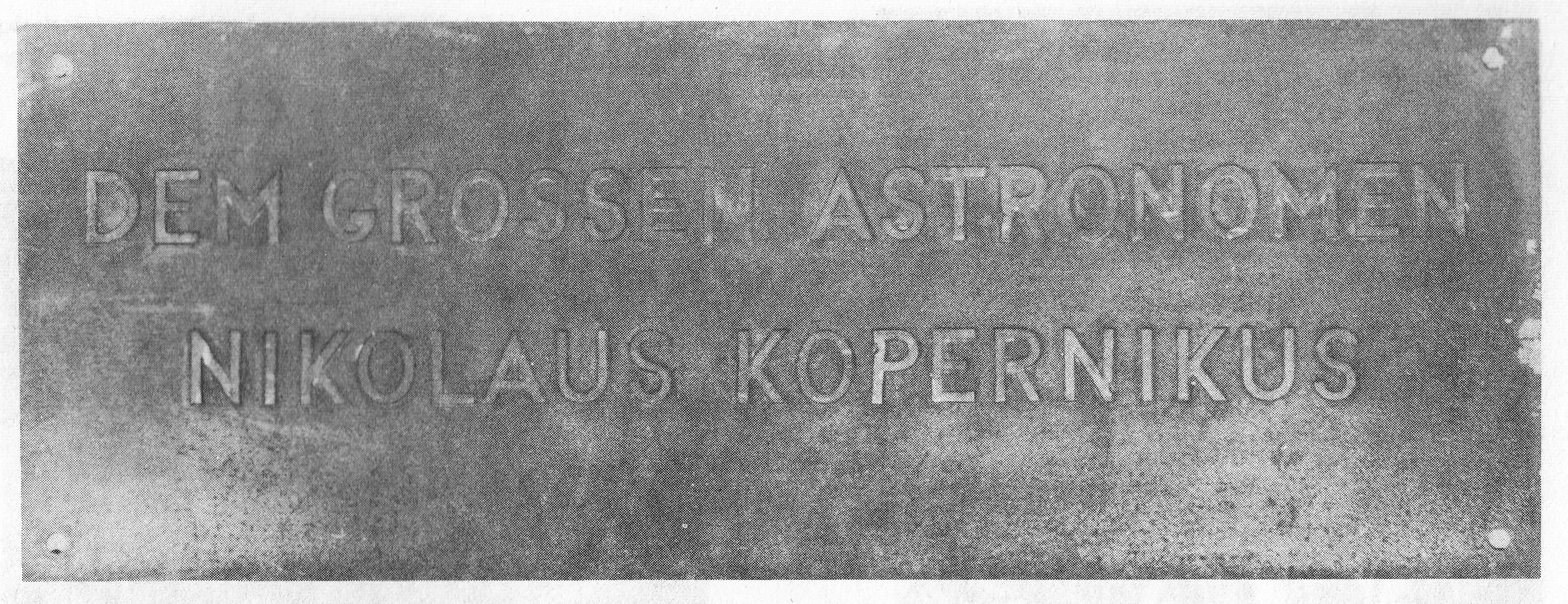 Tablica umieszczona w 1940 na pomniku Mikołaja Kopernika w Warszawie, zdjęta 11 lutego 1942 przez Macieja Aleksego Dawidowskiego